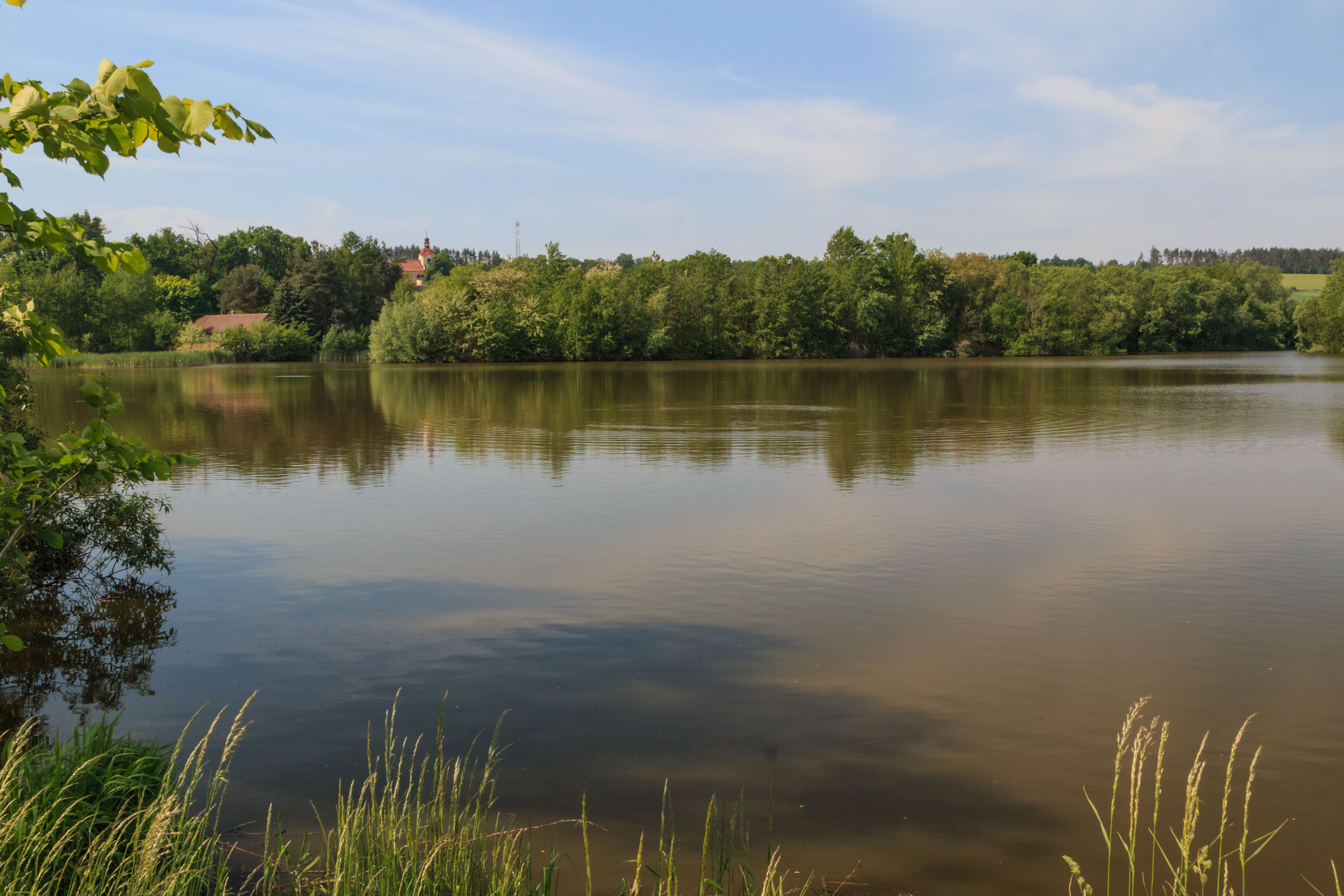 Rybník Pazderna u Zdechovic Project: Vodstvo.